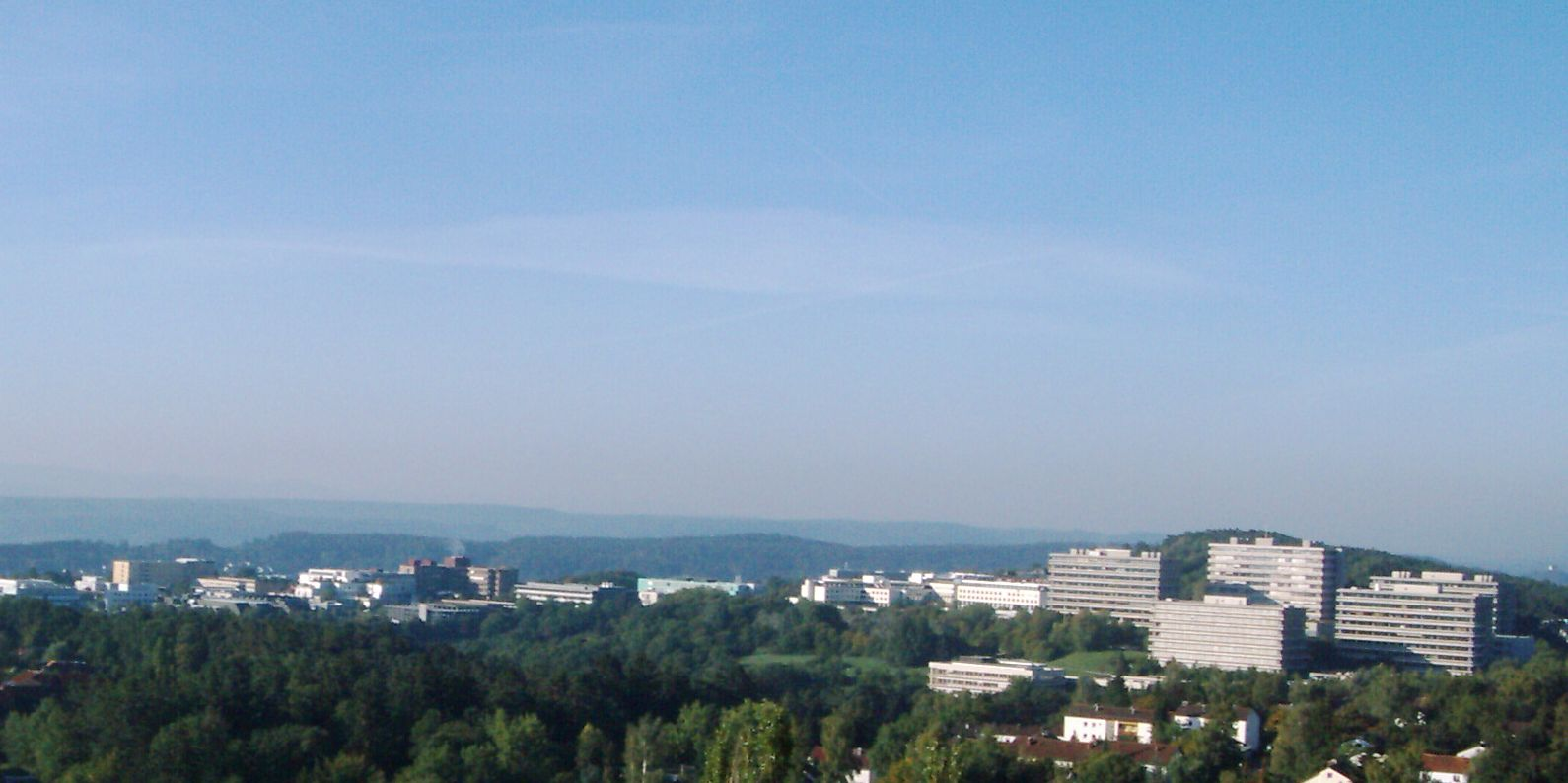 Blick auf den naturwissenschaftlichen und medizinischen Bereich der Tübinger Eberhard-Karls-Universität, aufgenommen am 18. September 2004. Zu sehen sind: Mathematik, Physik, Chemie und Biologie (die vier großen Gebäude ganz rechts), daneben etwas kleiner die BG Unfallklinik. Im Hintergrund die Schwäbische Alb.